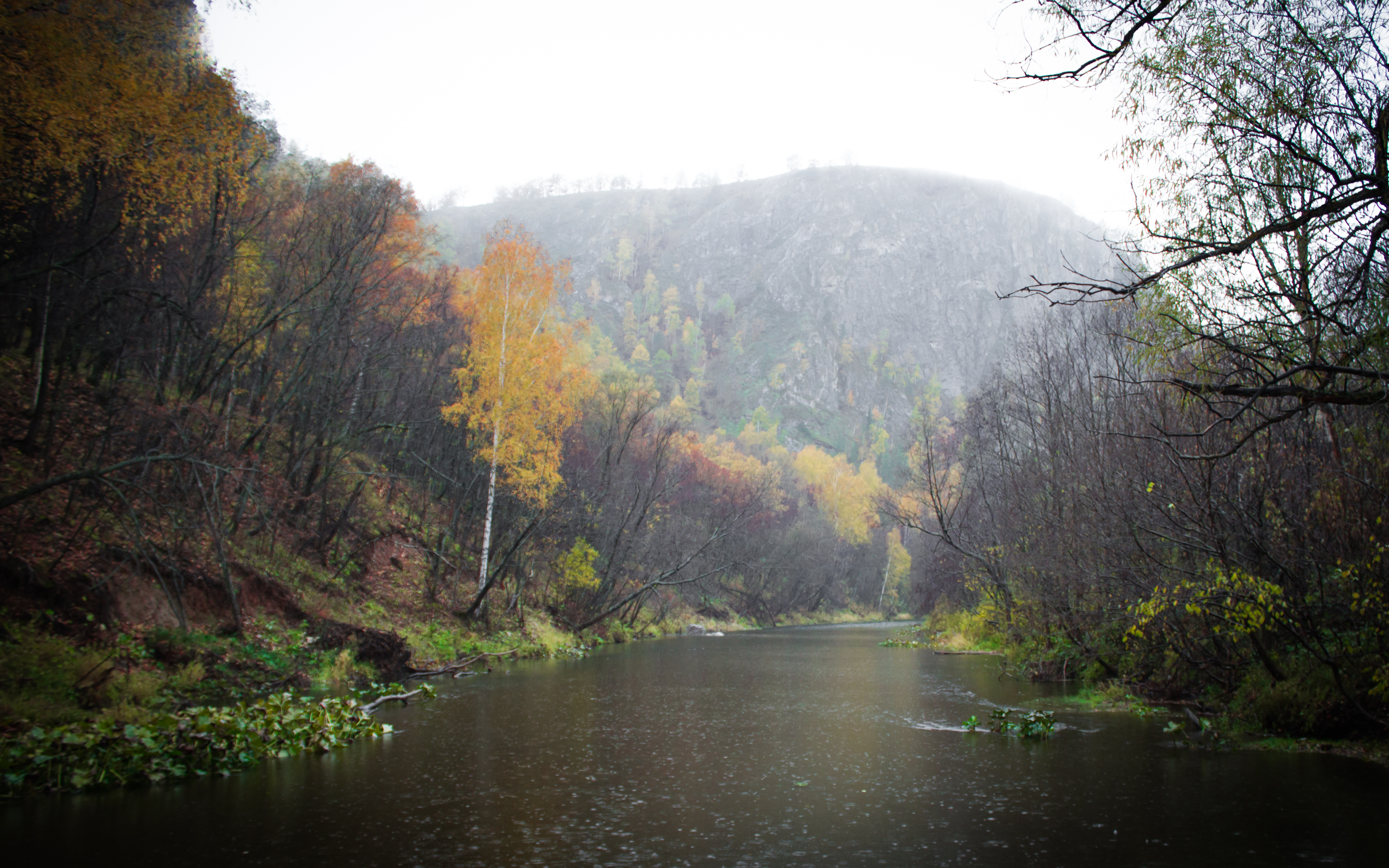 Мурадымовское ущелье, Бурзянский район This image is related to the protected area of Russia number 0210102